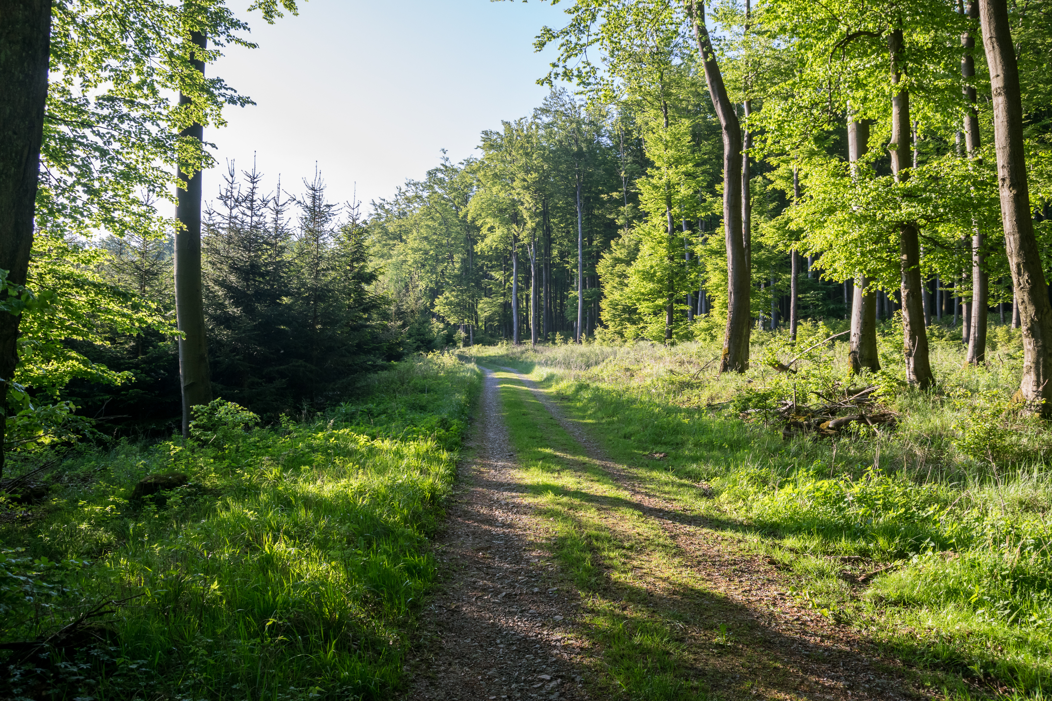 Naturschutzgebiet Wälder bei Blomberg, Blomberger Teil